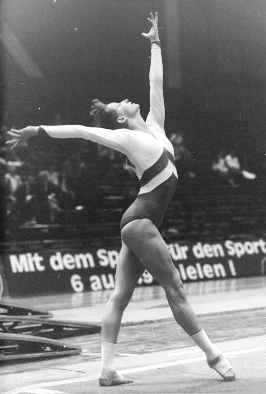 Birgit Senff ADN-ZB Kluge 30.5.84 Leipzig: 35. DDR-Meisterschaften im Turnen -Birgit Senff (hier am Boden) hinterließ bei der Pflicht am 29.5.84 in der Leipziger Messehalle einen guten Eindruck. Die 18jährige Leipzigerin belegte durch technisch ausgezeichnete und mit viel Eleganz vorgetragene Übungen vorerst den zweiten Platz.